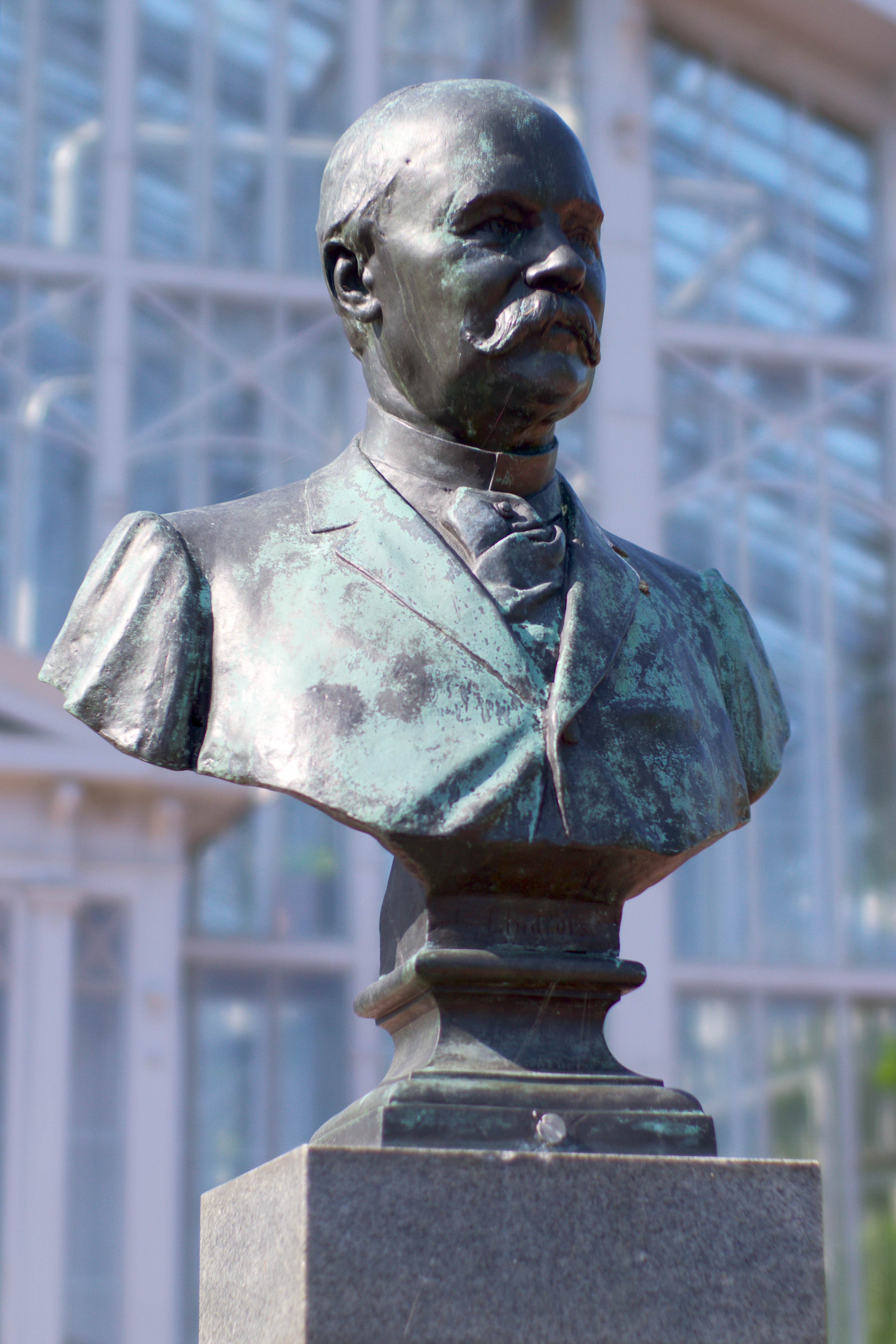 Julius af Lindforsin rintakuva (1909) - Walter Runeberg. Sijainti: Talvipuutarha, Taka-Töölö